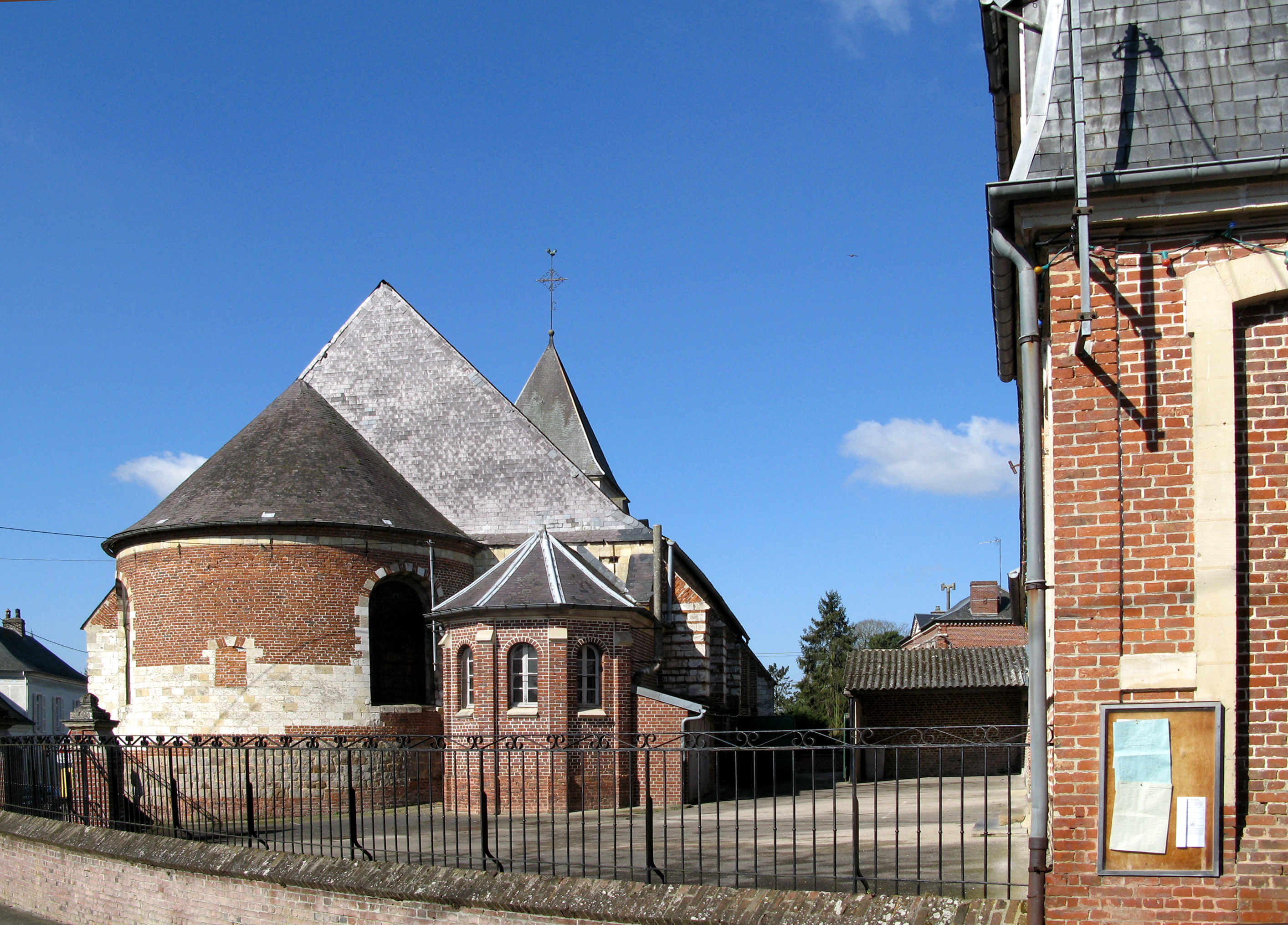 Warloy-Baillon (Somme, France) - Le chevet de l'église. Le bâtiment au premier plan, à droite, est la mairie.